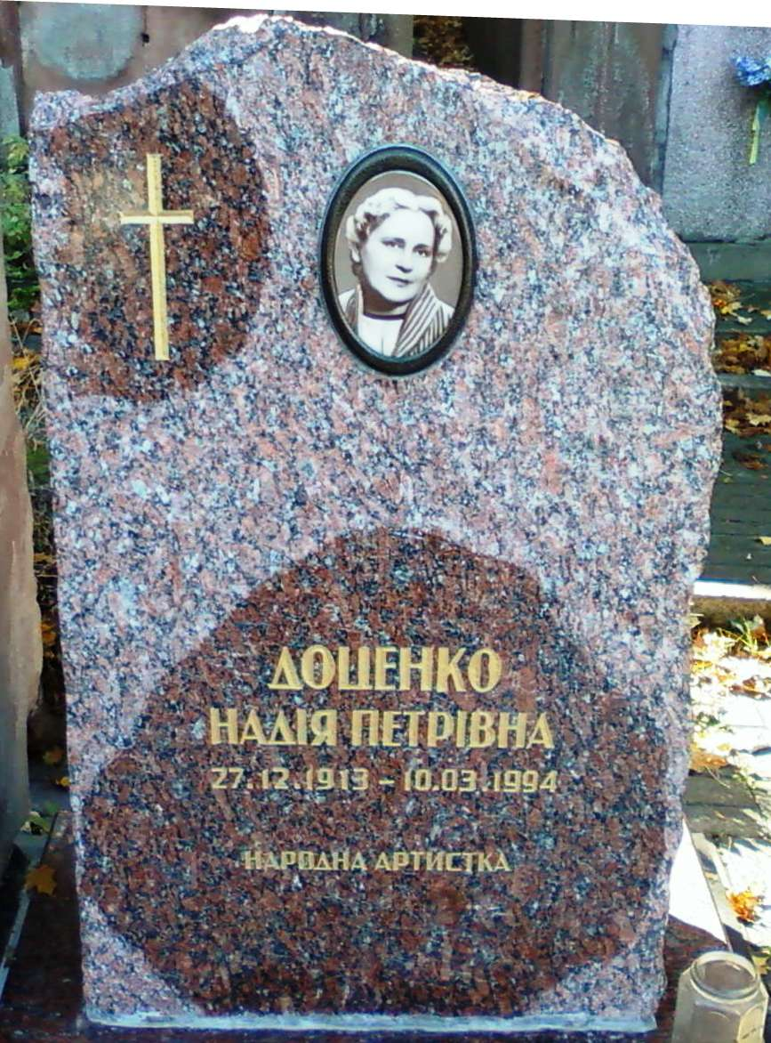 Надежда Петровна Доце́нко (1914—1994) — советская украинская актриса. Народная артистка СССР. Памятник на могиле Н. Доценко на Лычаковском кладбище (Львов)